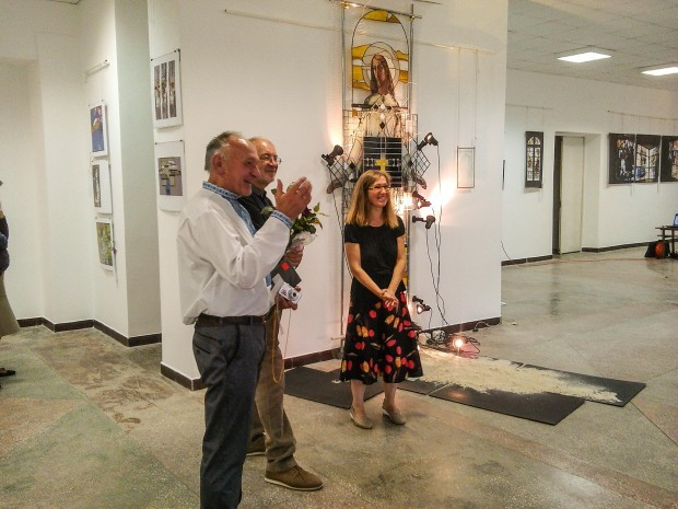 У виставковій залі Калуша відкрилась виставка – art-проект «Вітражі» відомих львівських вітражистів Олександра Личка і Юрія Павельчука.